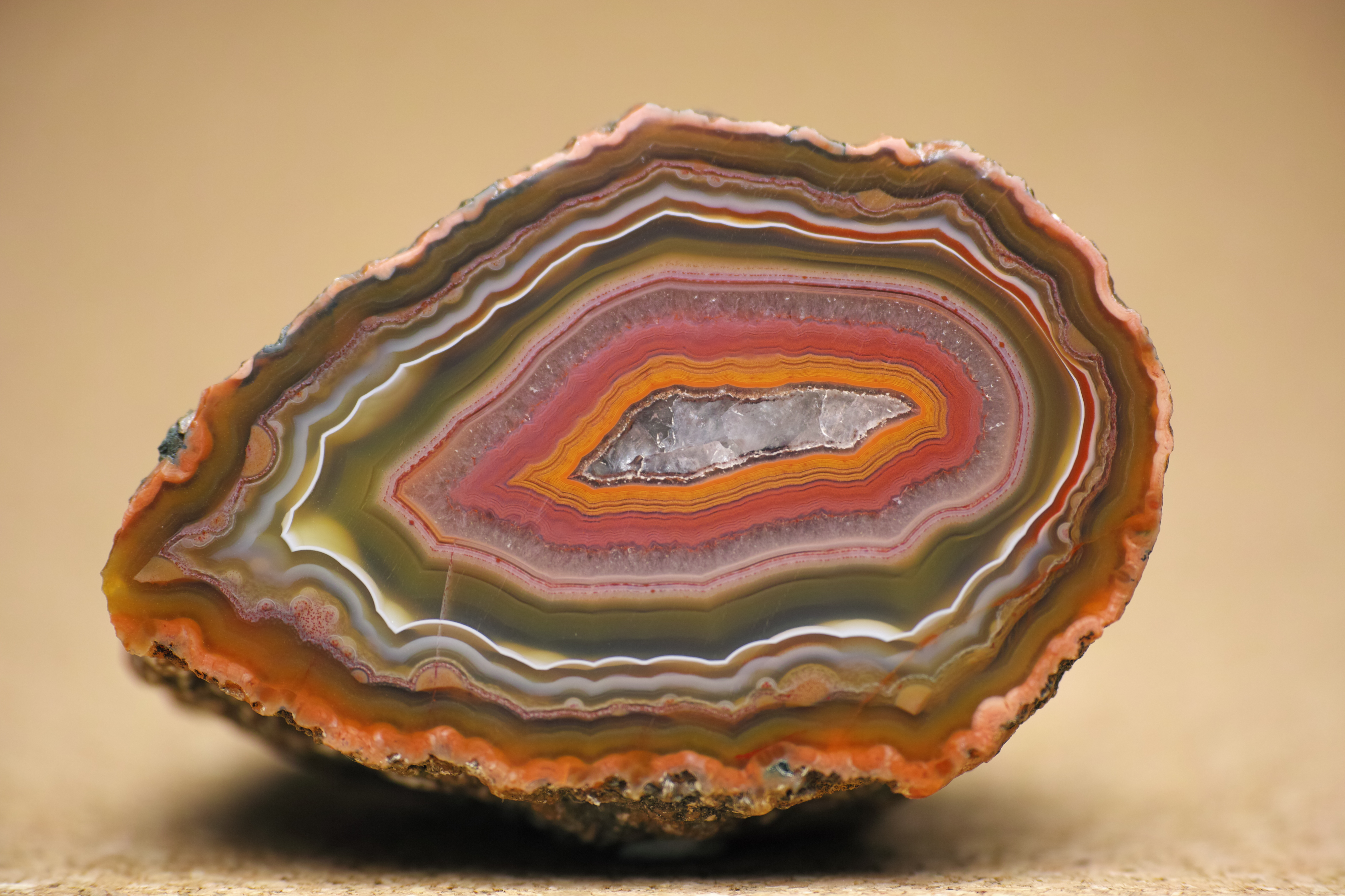 Condor Agate from Tesoro Escondido, San Rafael, Mendoza, Argentina